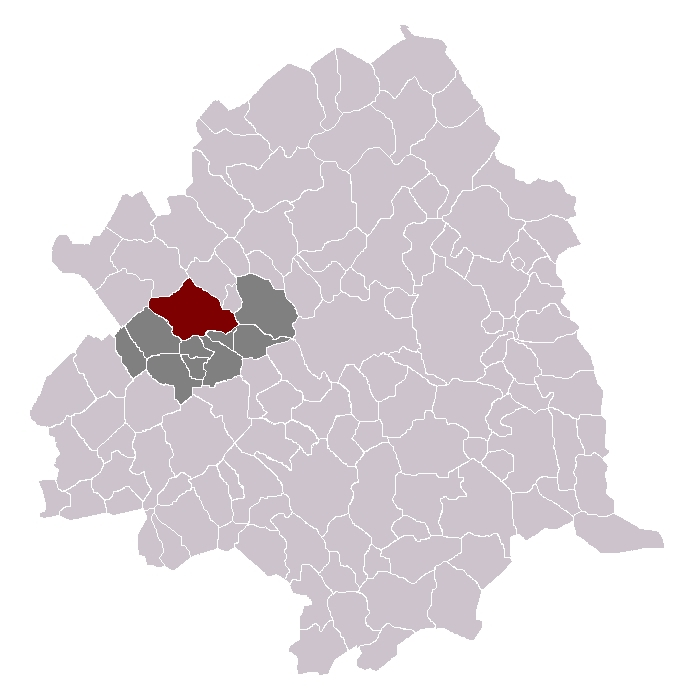 Ennetières-en-Weppes dans son canton et son arrondissement